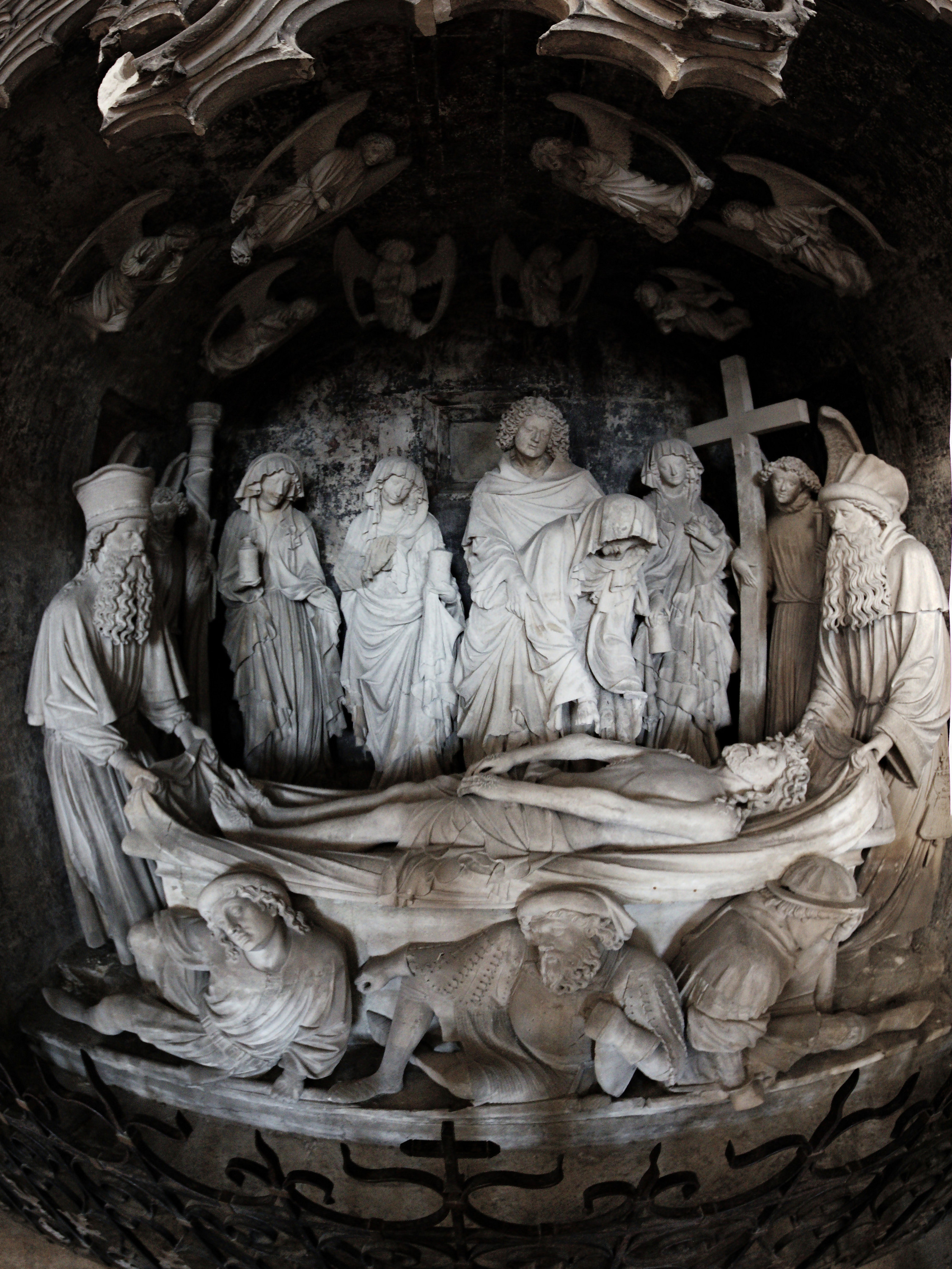 Mise au tombeau du début XVe, sise à l'église Saint-Martin de Pont-à-Mousson. Elle a exercé une large influence sur les mises au tombeau ultérieures, dont le "Sépulcre" de Ligier Richier à Saint-Mihiel, réalisé un siècle plus tard. Composé de 13 personnages (21 si l'on compte les angelots), le sépulcre a été élevé entre 1425 et 1430 pour le tombeau de Baldemar-Johannis de Biebelnheim.